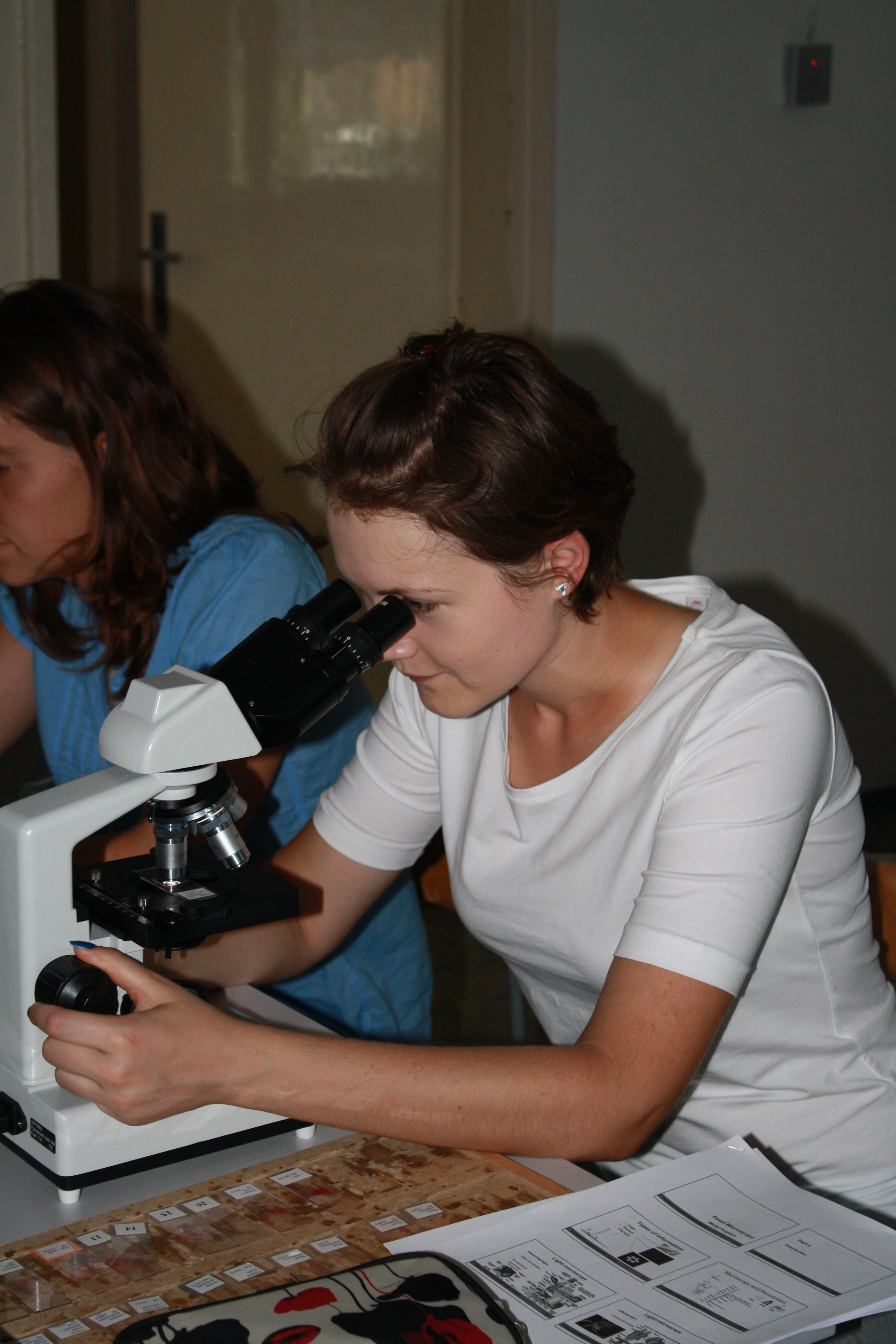 Mikroskopické metody